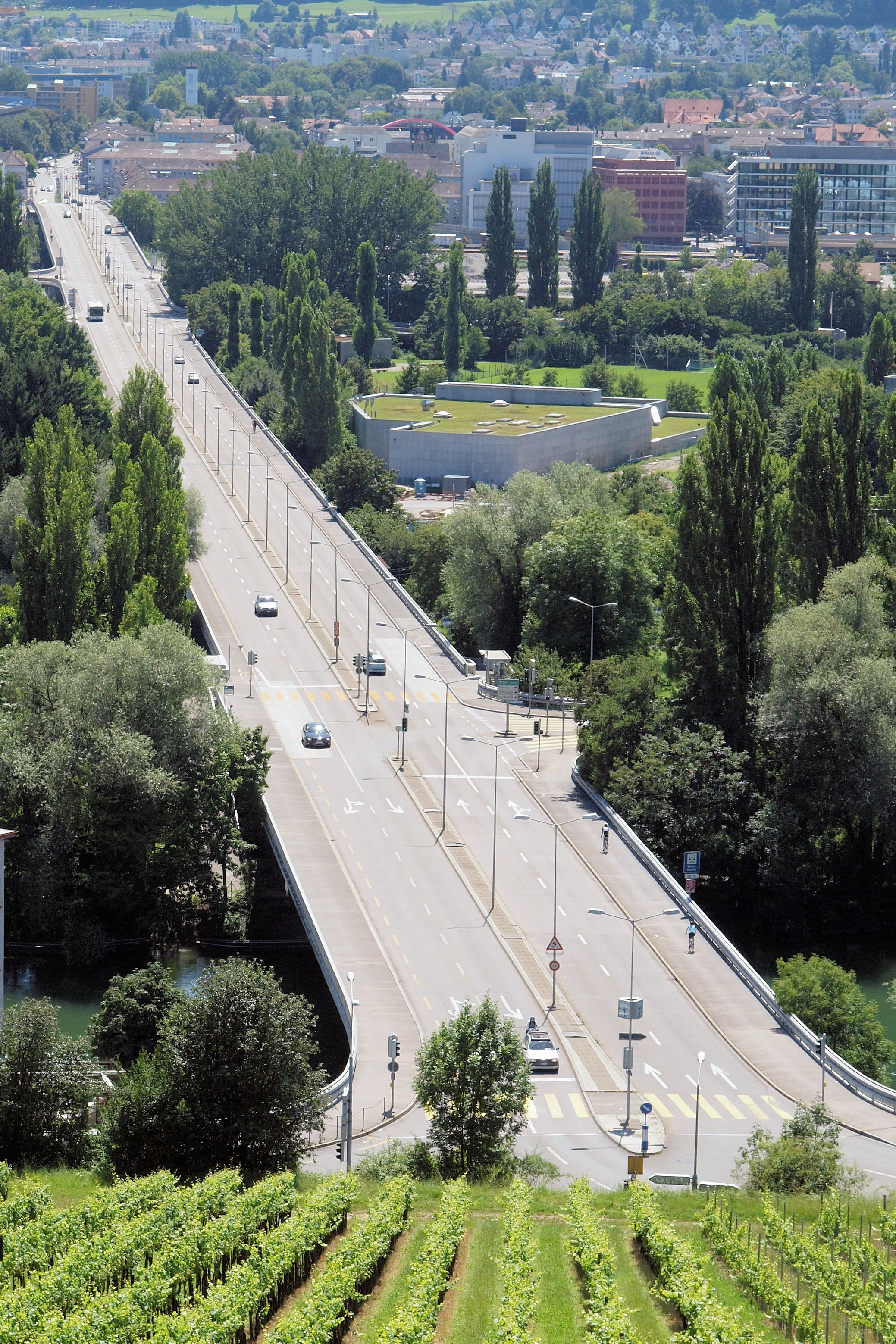 Die Europabrücke in Zürich, von der Kirche Flundern aufgenommen.